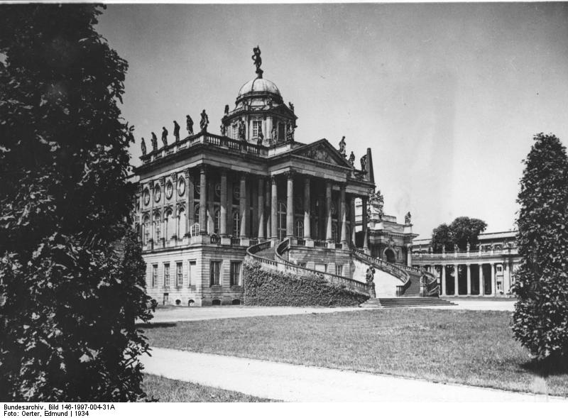 Potsdam (Kurmark Brandenburg) : Die Communs, westlich des Neuen Palais, in den Jahren 1763-69 nach Plänen von Legeay erbaut. Motiv aufgenommen im Jahre 1934.